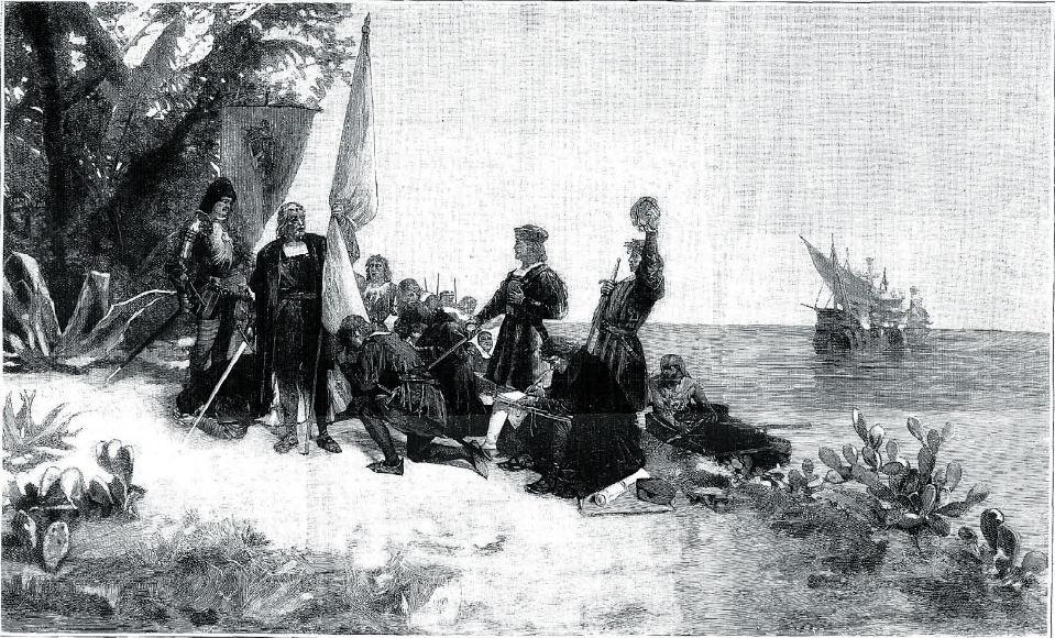 Grabado copia del cuadro Colón tomando posesión de la isla de San Salvador (1890) de Isidro Gil Gabilondo